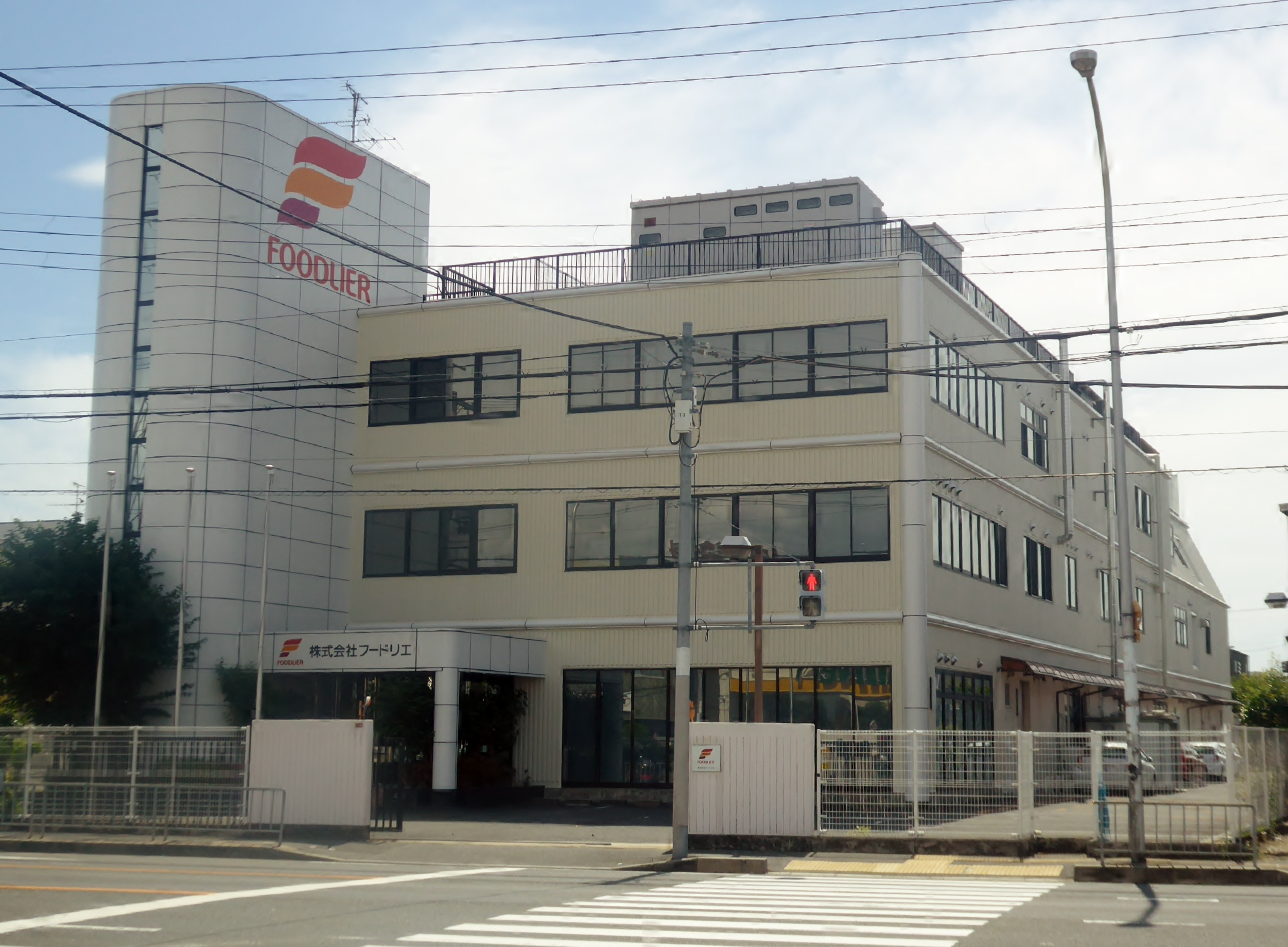 株式会社フードリエ本社を撮影。